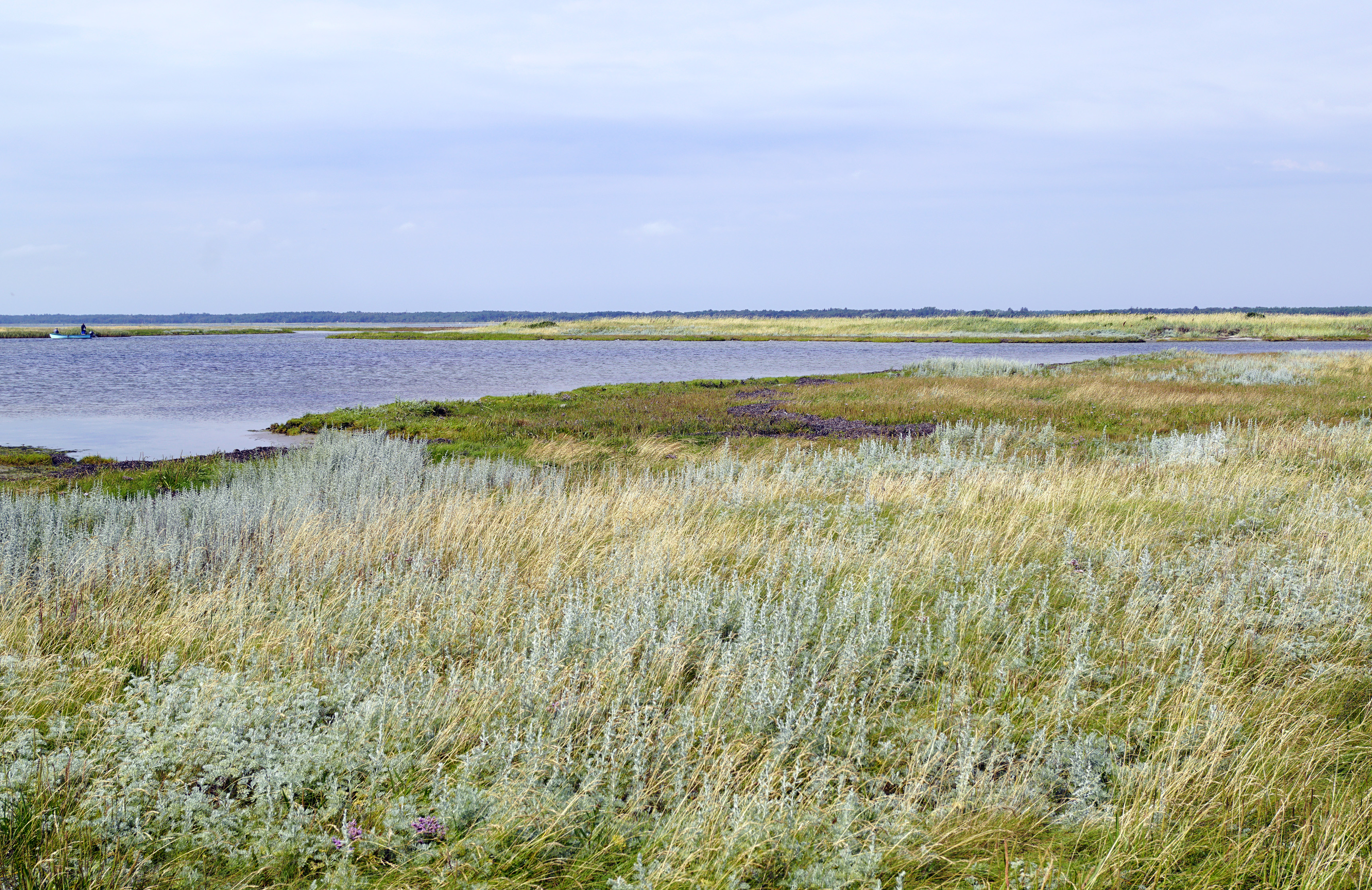 Bløden Hale ved østenden af Læsø, med øerne Store Knot og Lille Knot på den anden side af Slusen